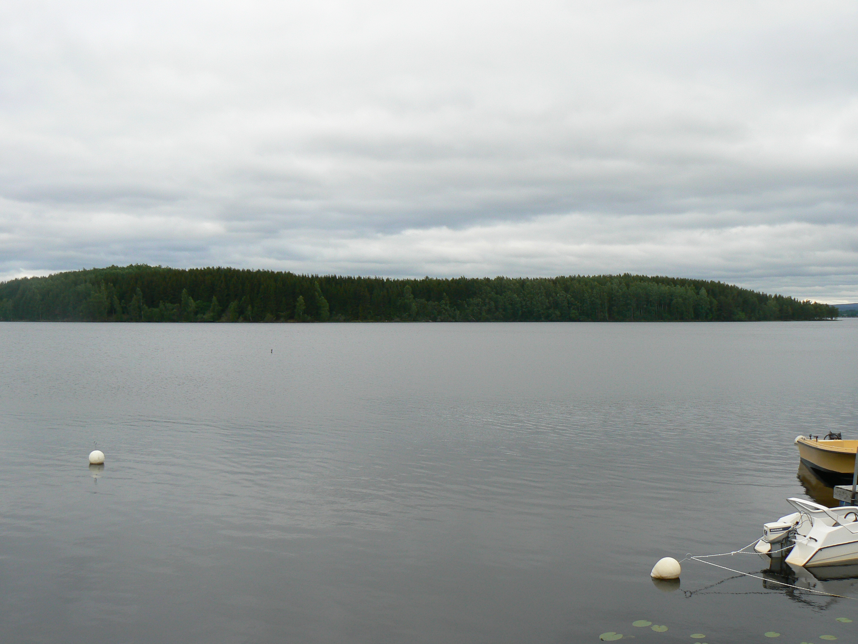 Stabergs ö, island in Lake Runn, Dalarna, Sweden.